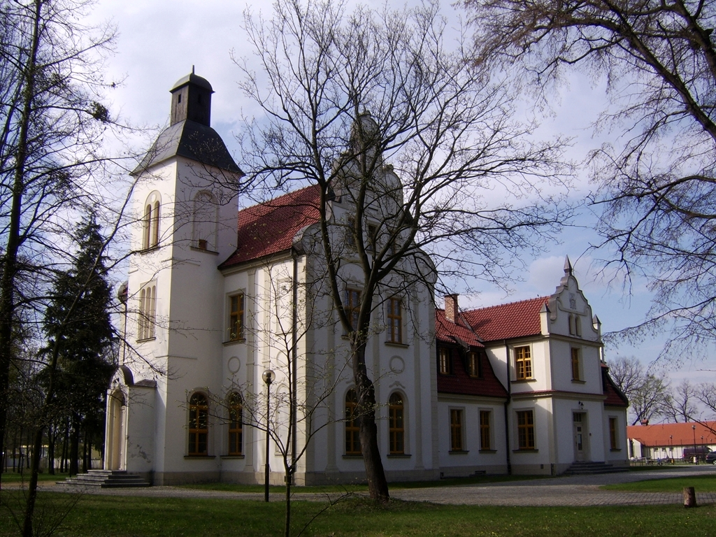 Przysiek - dwór w stylu eklektycznym